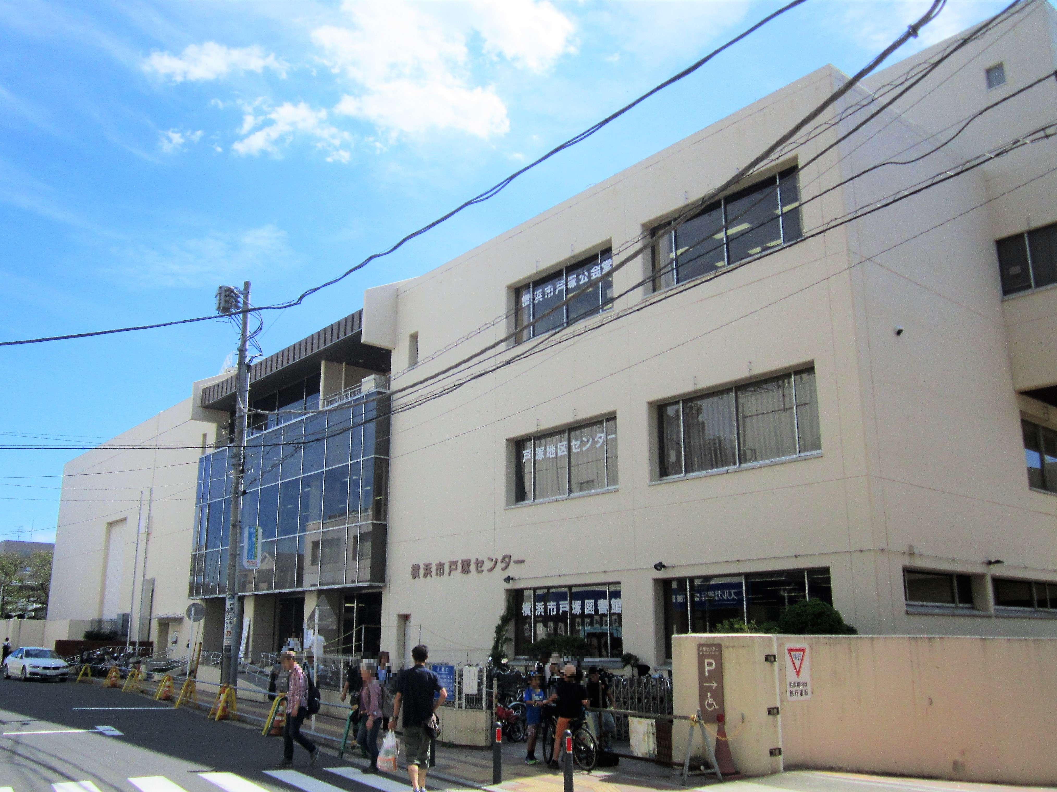 横浜市戸塚センター（戸塚図書館・戸塚地区センターなど、横浜市戸塚区戸塚町）